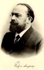 Porträt des Artzes Ottmar von Angerer